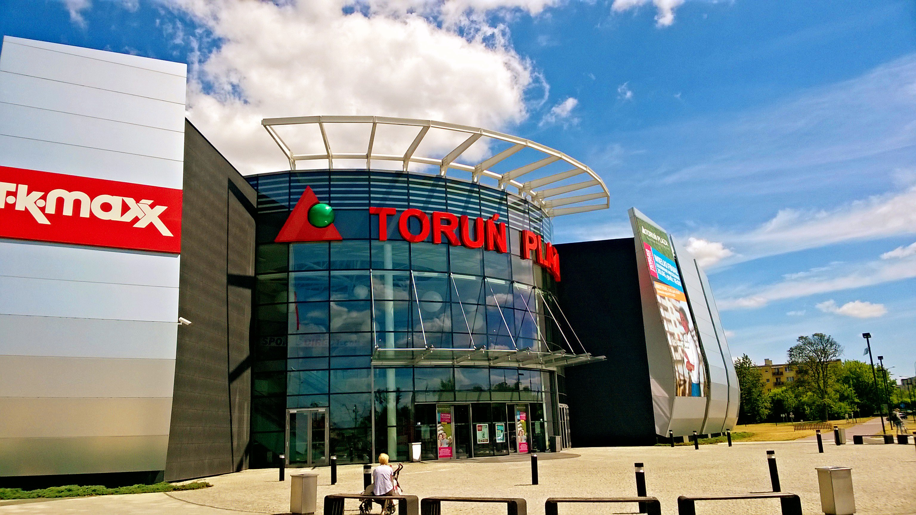 Centrum handlowe Toruń Plaza1